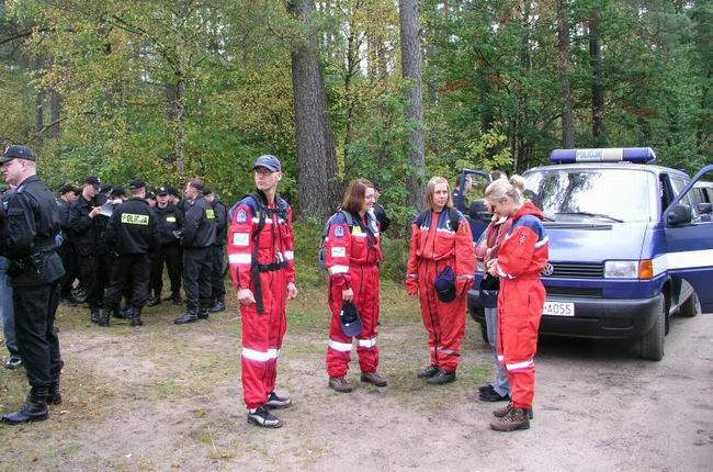 Akcja poszukiwawcza we współpracy z Policją 06 października 2004